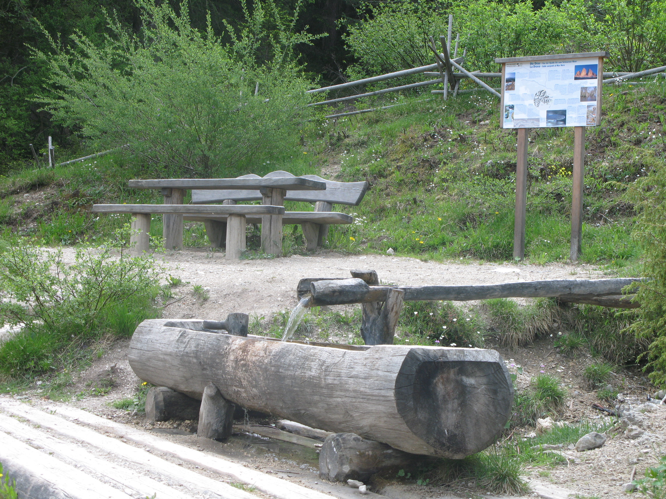 Izvir Drave na Toblaškem polju blizu San Candida (nem. Innichen).